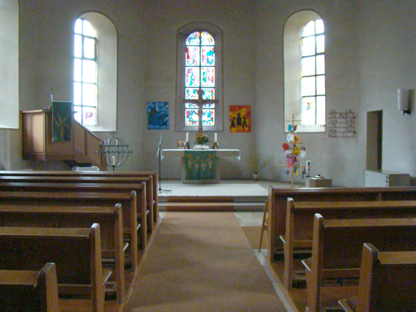 Innenansicht der Pfarrkirche St. Kunibert in Untereisesheim